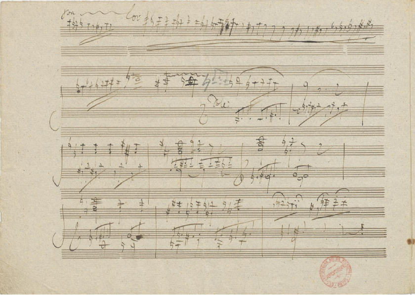 Cadence pour le premier mouvement du concerto pour piano et orchestre no 3, op. 37 / Ludwig van Beethoven